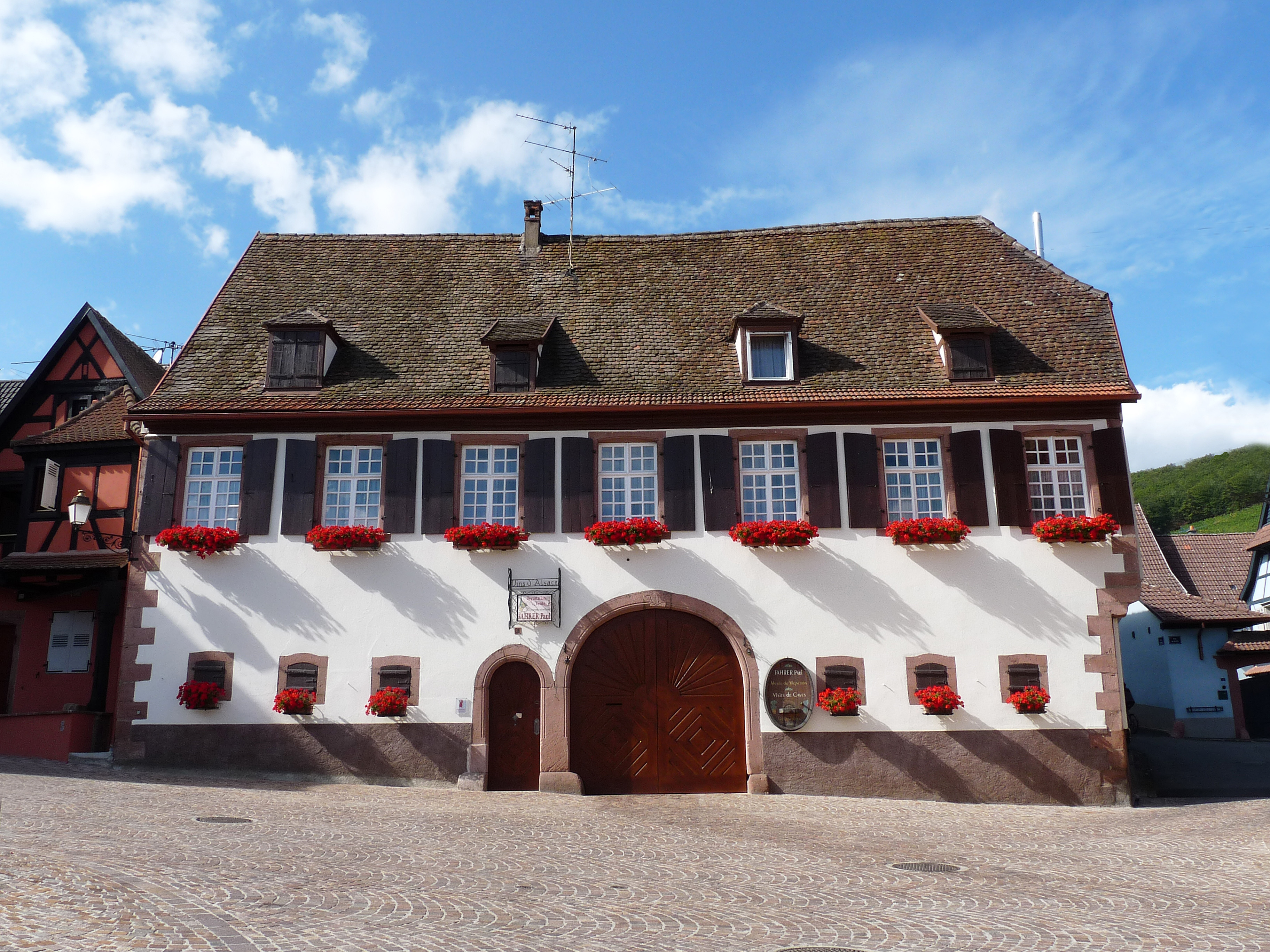 Orschwiller (Bas-Rhin) : ancienne maison d'habitation de François Ignace Kœbel, dernier bailli du Haut-Kœnigsbourg (1726).